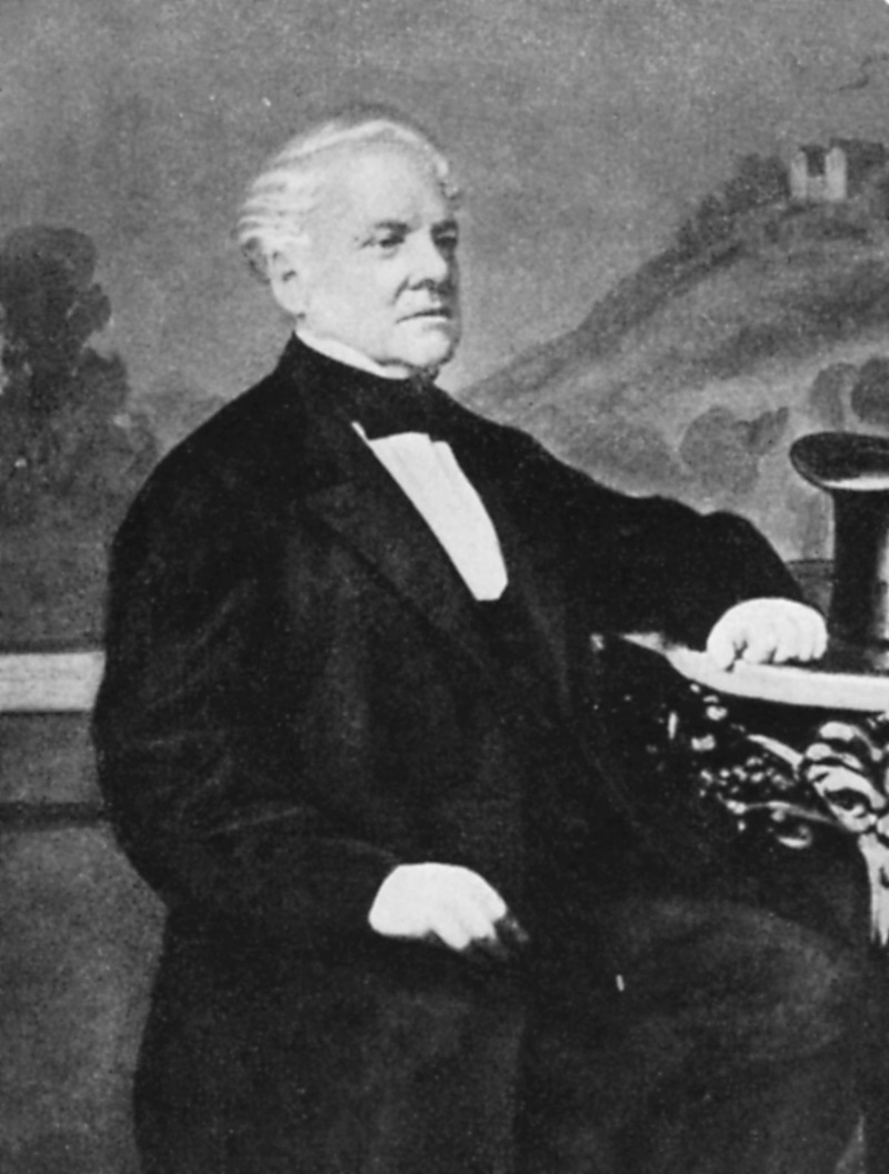 Heinrich Titot (1796-1871) ca. 1870